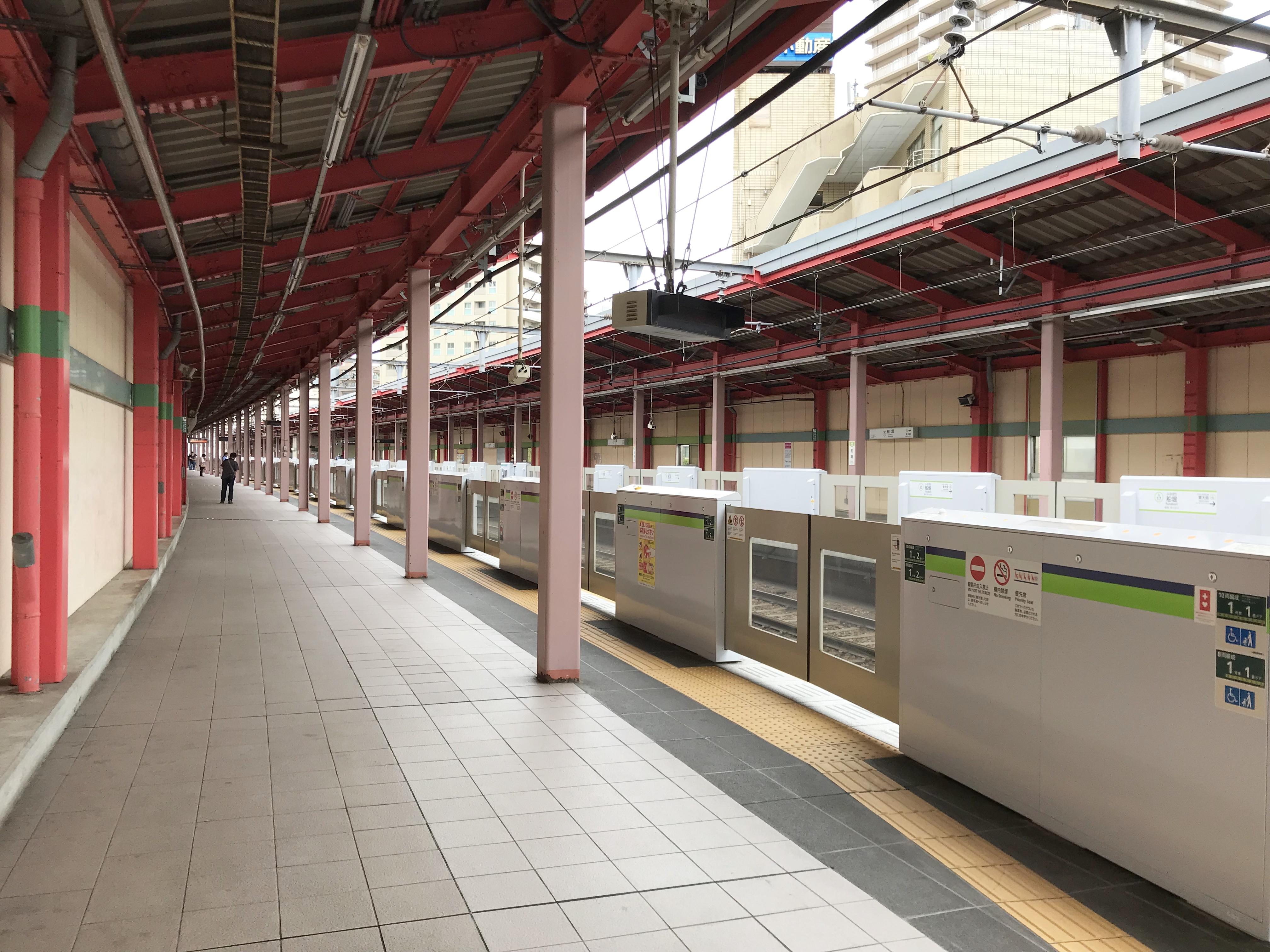 都営地下鉄新宿線船堀駅ホーム